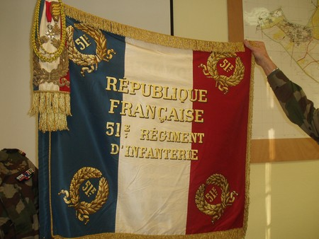 drapeau du 51 R.I